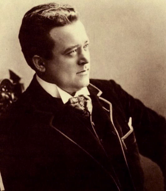 Karel Burian (1870-1924), czech tenor